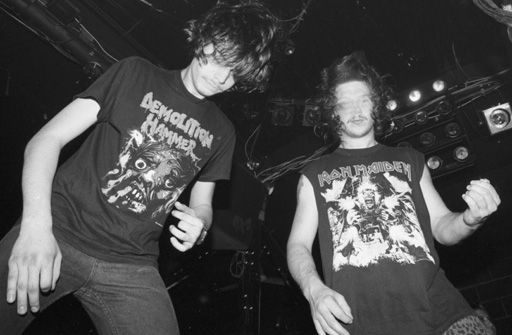 Heavy Metaller in der Disco Fantasy (1981-2001) in München-Neuaubing